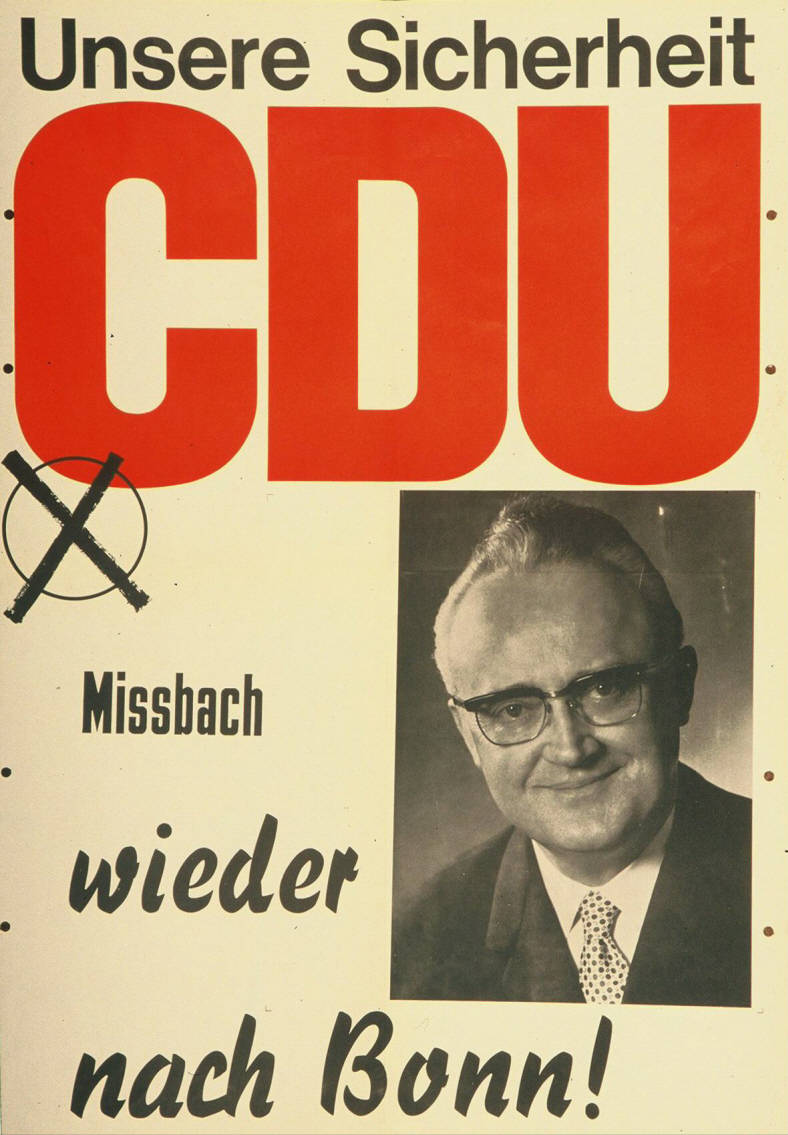 Unsere Sicherheit CDU Missbach wieder nach Bonn! Abbildung: Porträtfoto - Stimmkreuz Plakatart: Kandidaten-/Personenplakat mit Porträt Auftraggeber: CDU Bonn Drucker_Druckart_Druckort: KVD Köln Objekt-Signatur: 10-001: 1261 Bestand: Plakate zu Bundestagswahlen (10-001) GliederungBestand10-18: Plakate zu Bundestagswahlen (10-001) » Die 5. Bundestagswahl am 19. September 1965 » CDU » Mit Porträtfoto Lizenz: KAS/ACDP 10-001: 1261 CC-BY-SA 3.0 DE